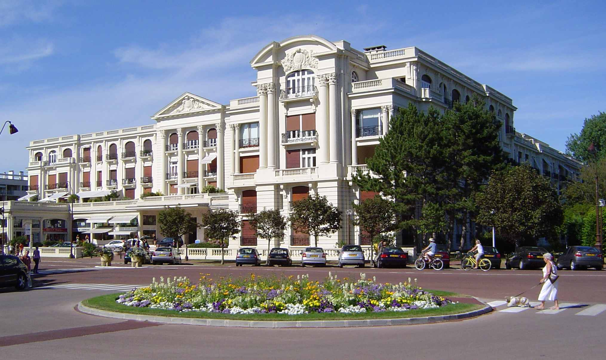 Photo prise par moi-même le 18 juillet 2006